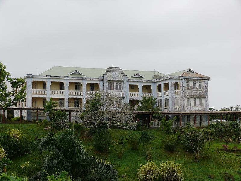 Old nurses' quarters, Colonial Memorial Hospital, Suva, Fiji